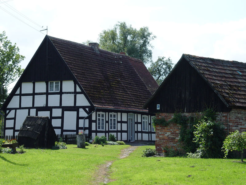 Dawna szkoła w Swołowie z połowy XIX wieku